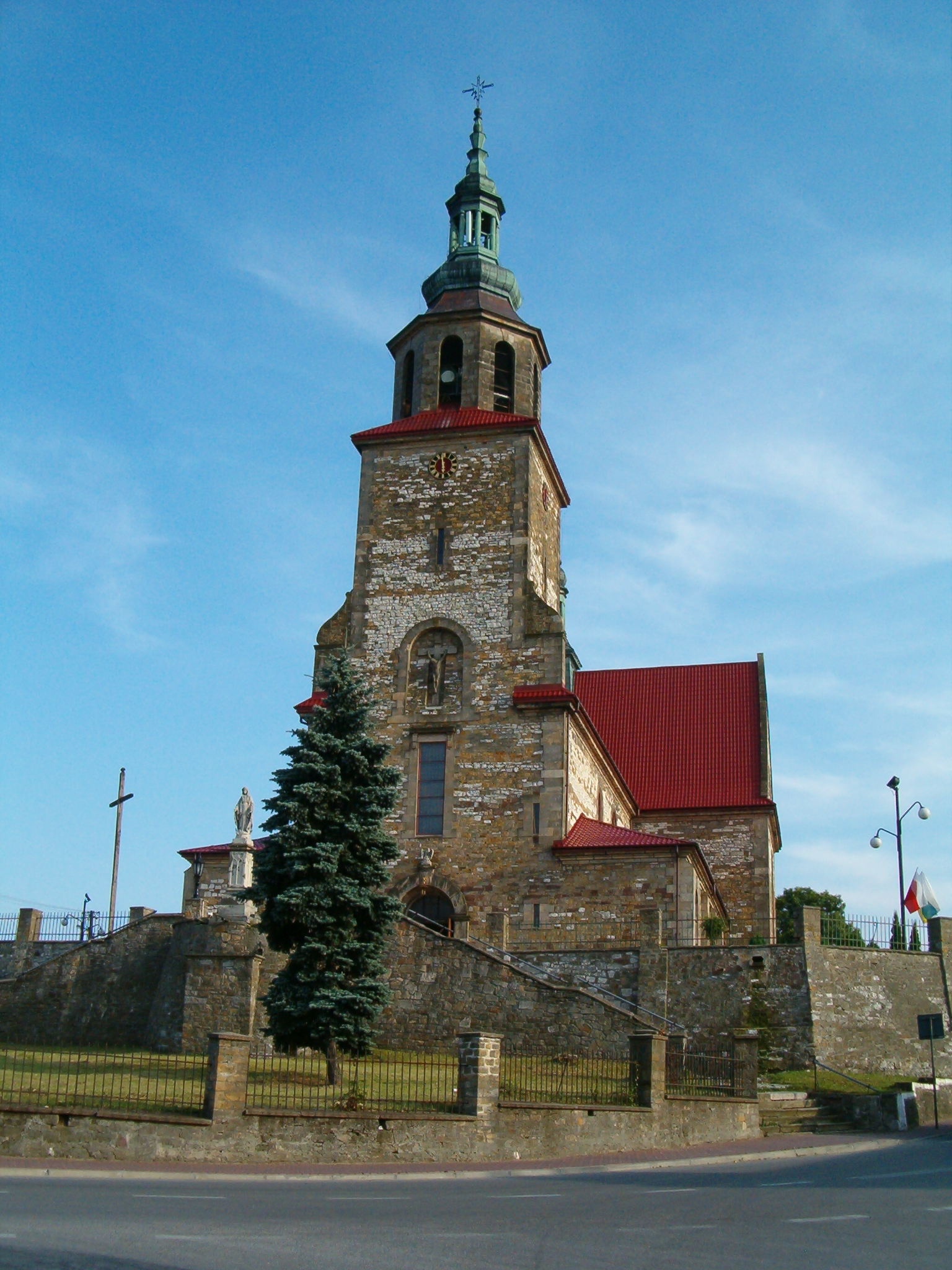 Kościół parafialny w Łopusznie pod wezwaniem Podwyższenia Krzyża Świętego budowany w latach 1926 - 1933. Autorem projektu był architekt Wacław Borowiecki. Polska, woj. świętokrzyskie, powiat kielecki, gmina Łopuszno.